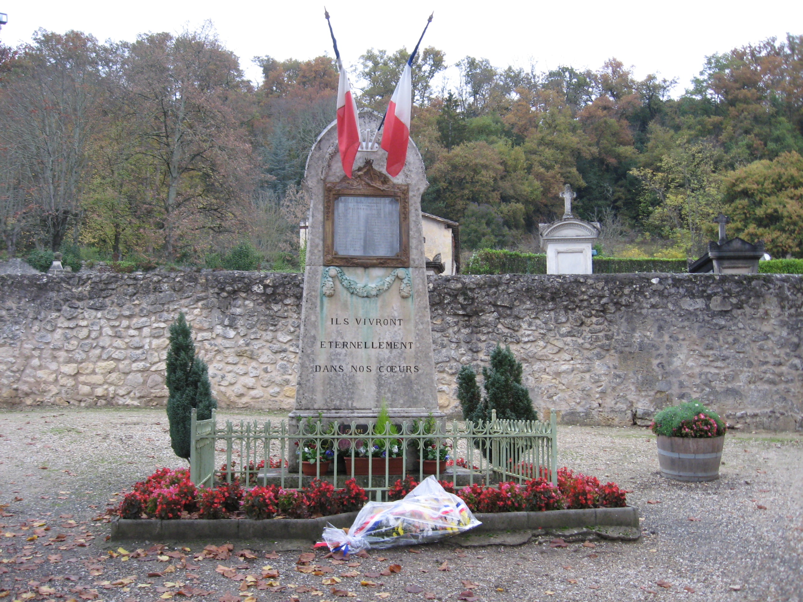 Monument aux morts de Baurech (Gironde)